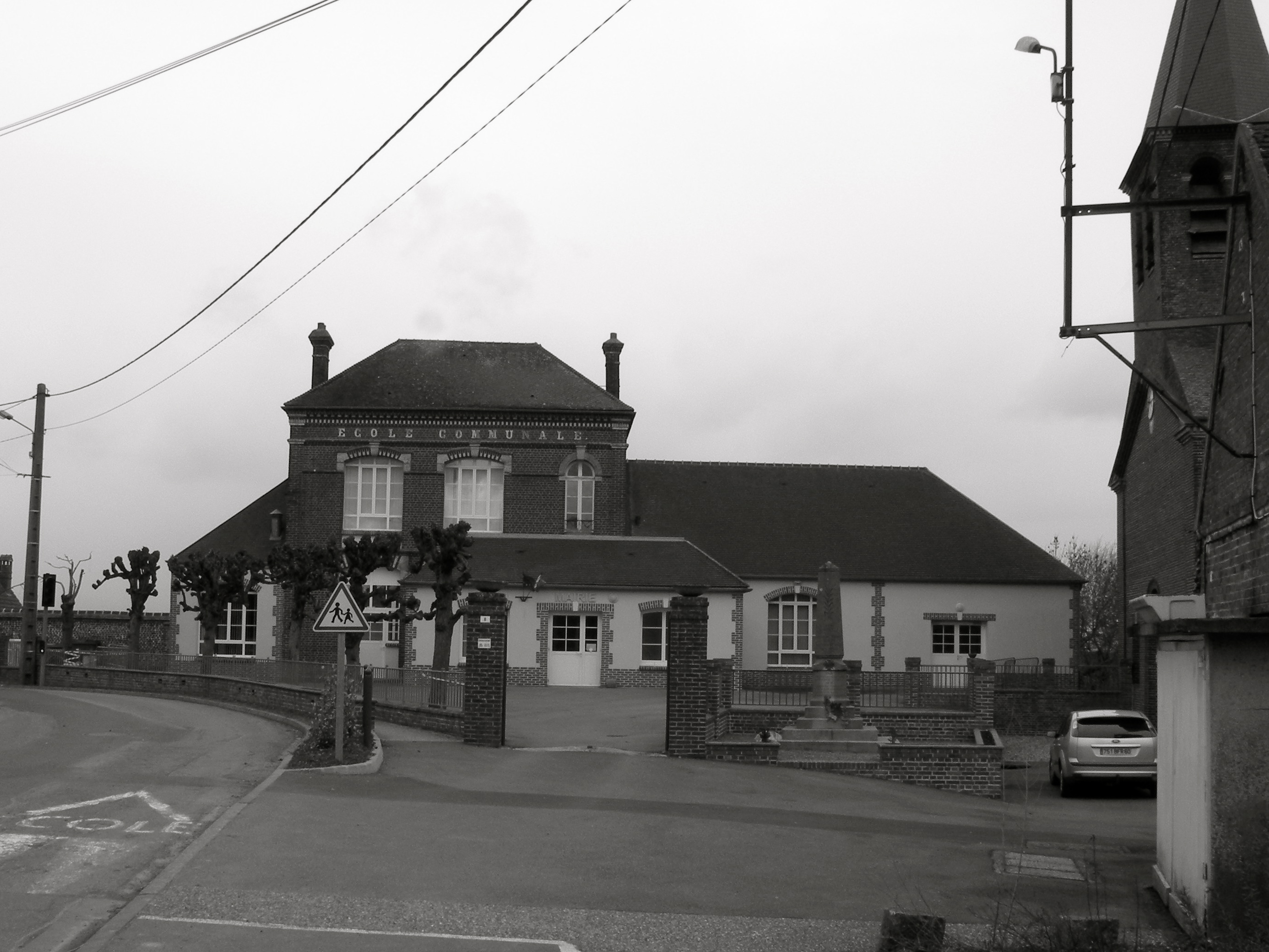 mairie de Saint-Germain-la-Poterie en noir et blanc